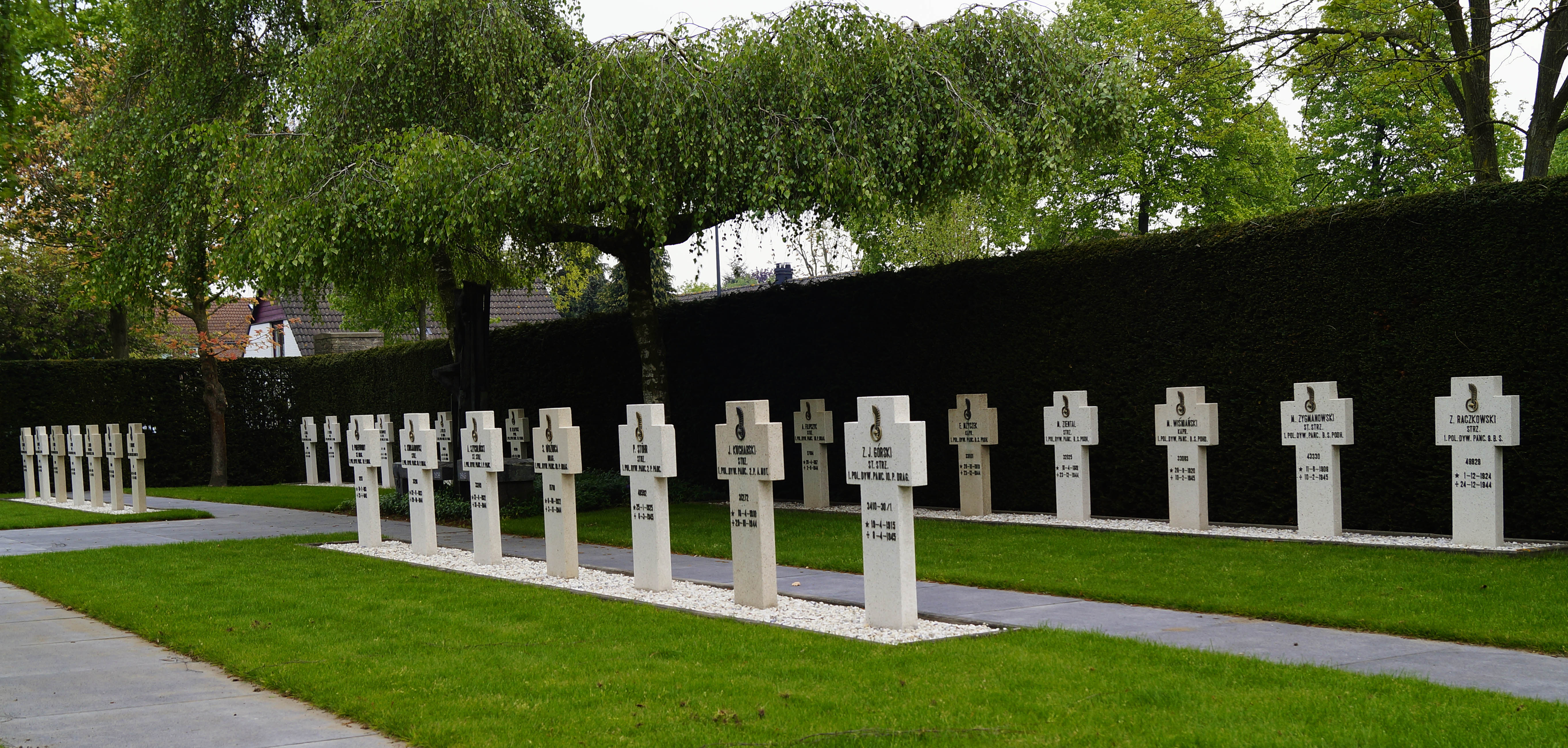 Ereveld Oosterhof, Oosterhout, Nederland